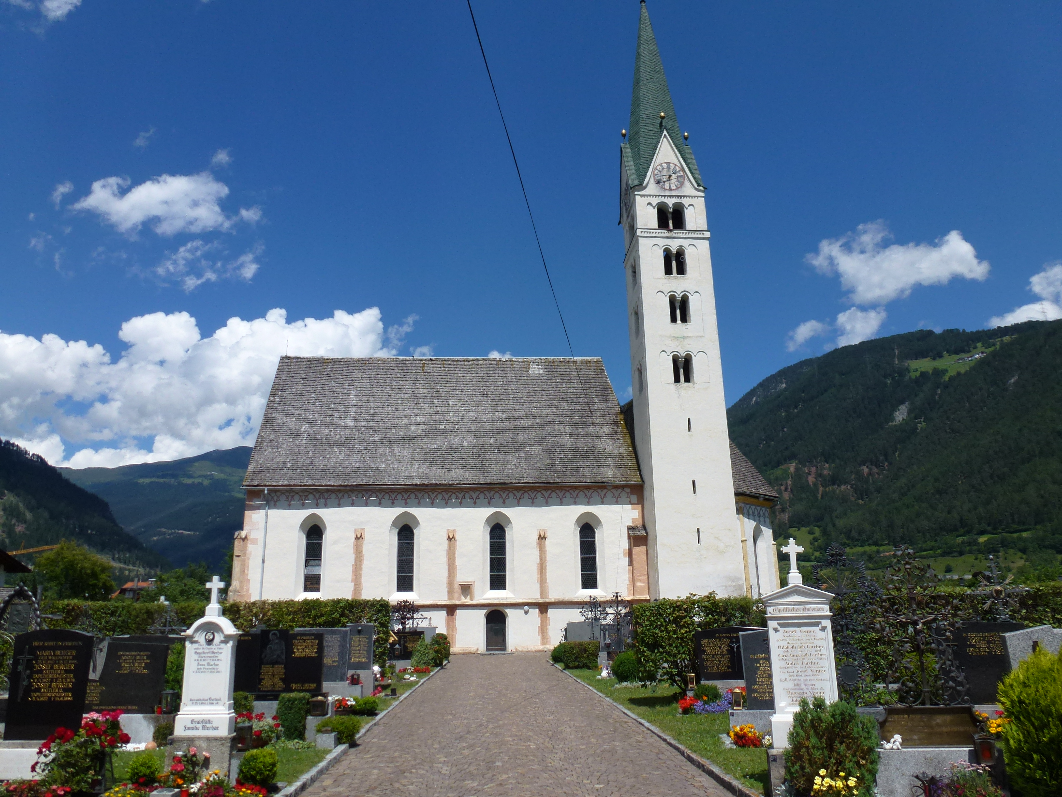 Kath. Pfarrkirche Maria Himmelfahrt - Prutz